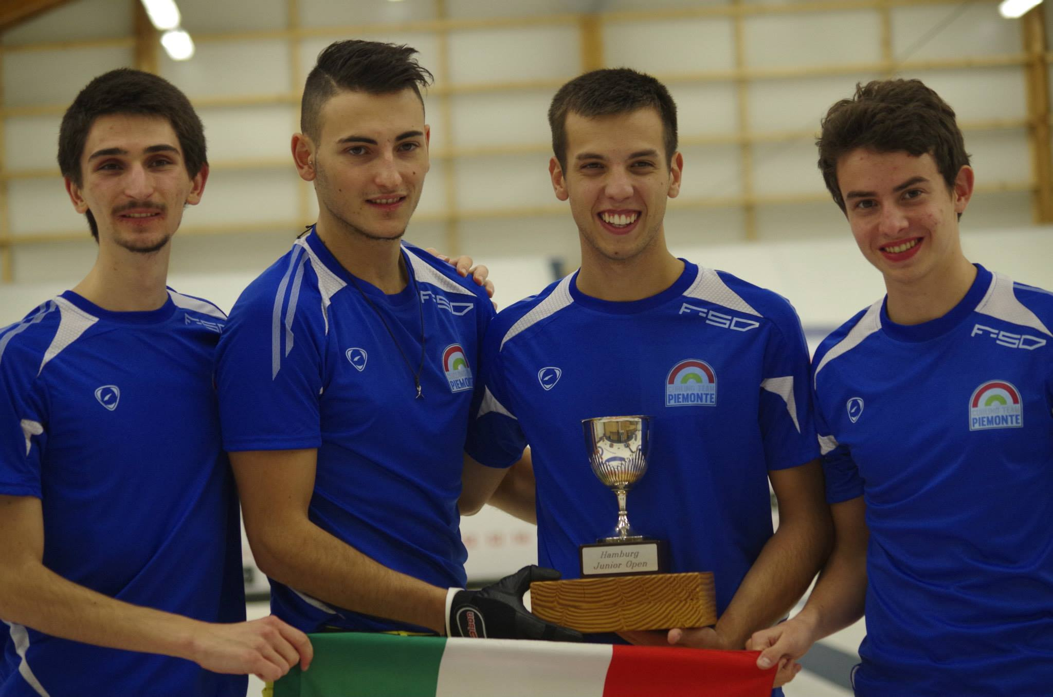 Team Piemonte Campione all'Hamburg Junior Open del 2104 ad Amburgo in Germania